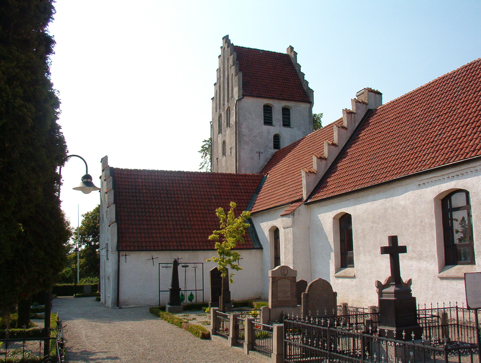 Date: June, 2003